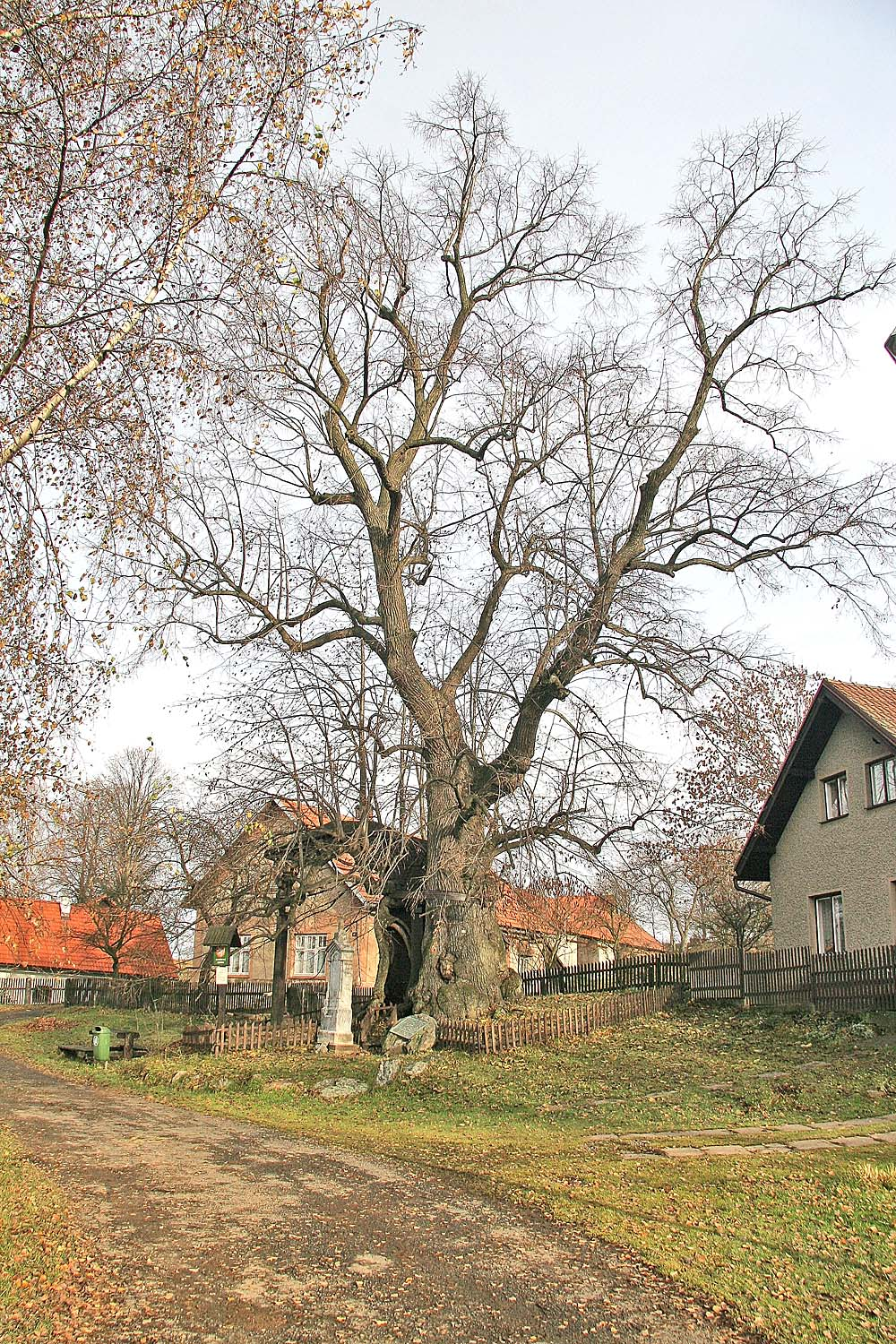 Klokočovská lípa na podzim